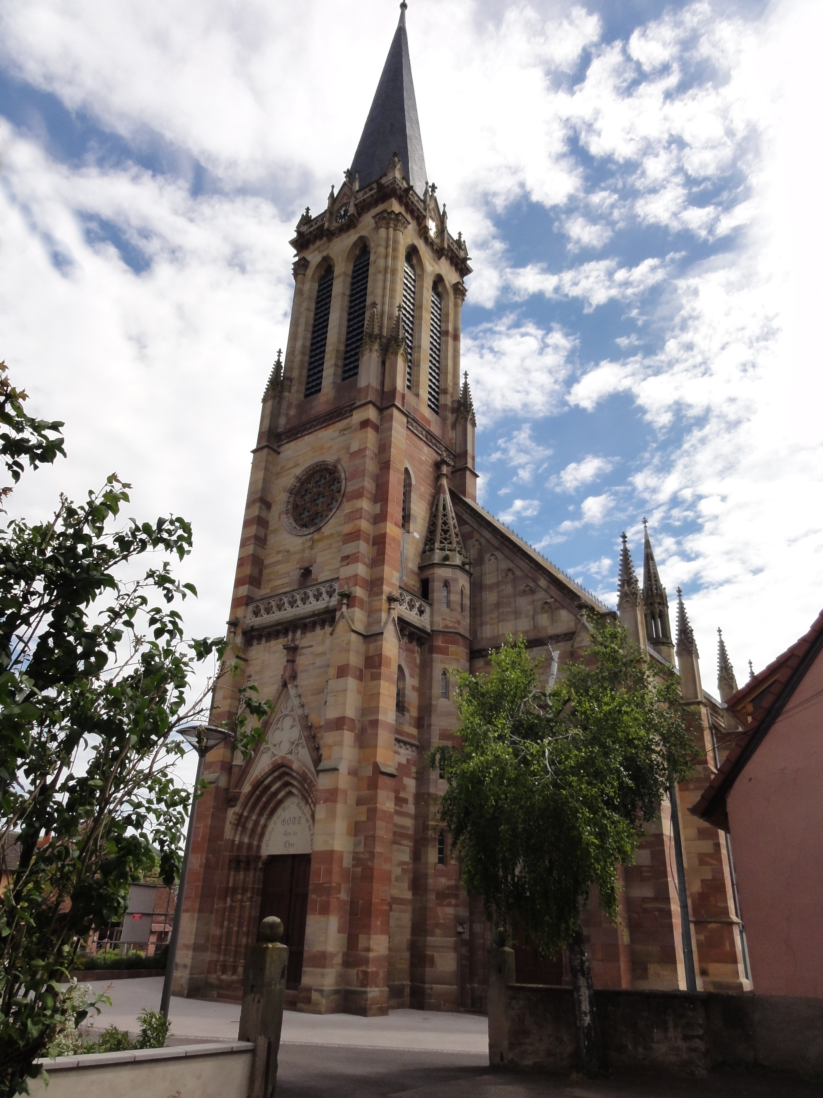 Alsace, Bas-Rhin, Westhoffen, Église protestante luthérienne Saint-Martin (PA00085223, IA67006260).